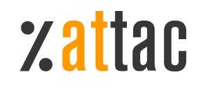 Logo von Attac Österreich